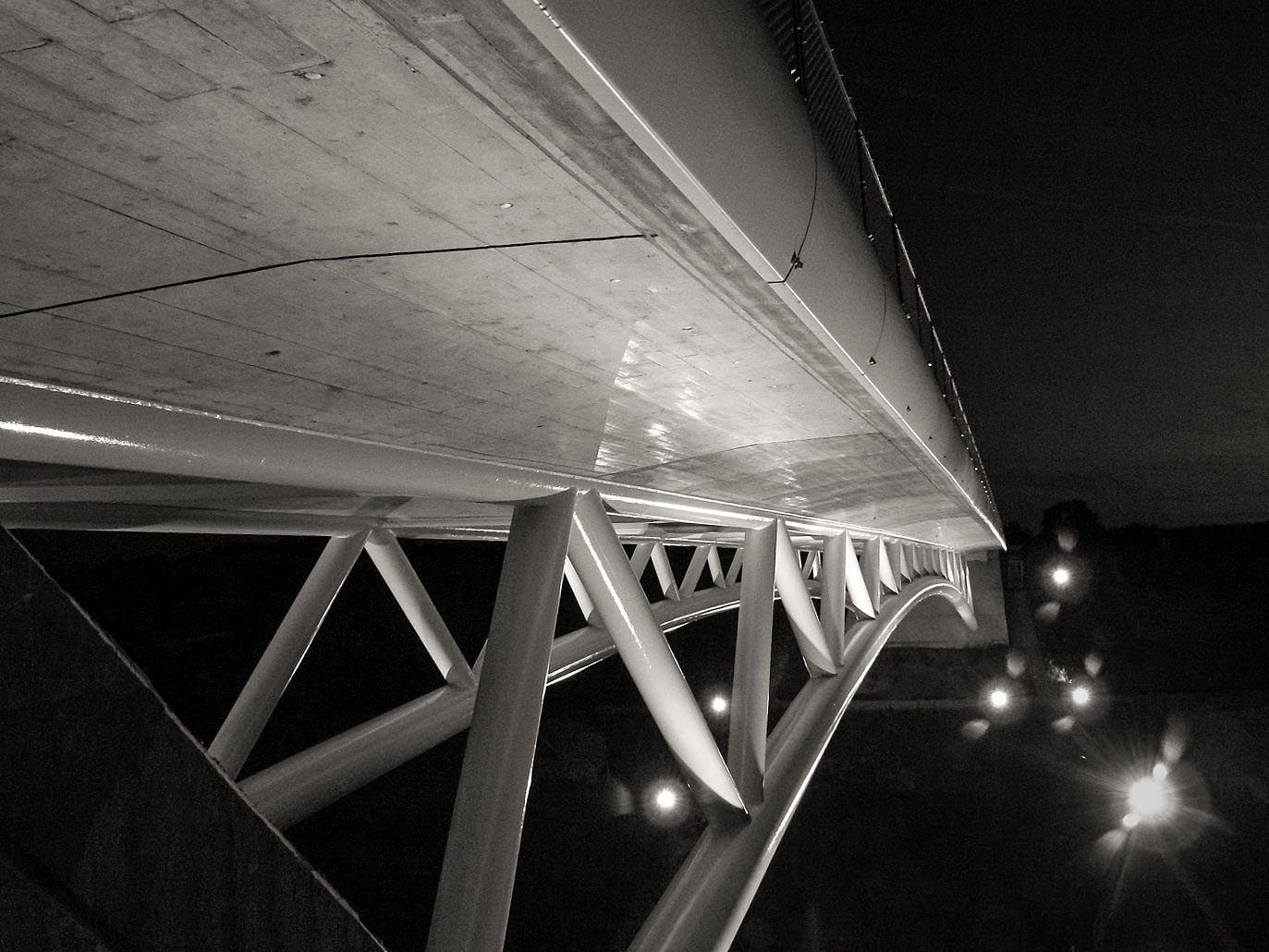 Angestrahlte Stahlfachwerkbrücke über die A73 bei AS Lichtenfels-Nord